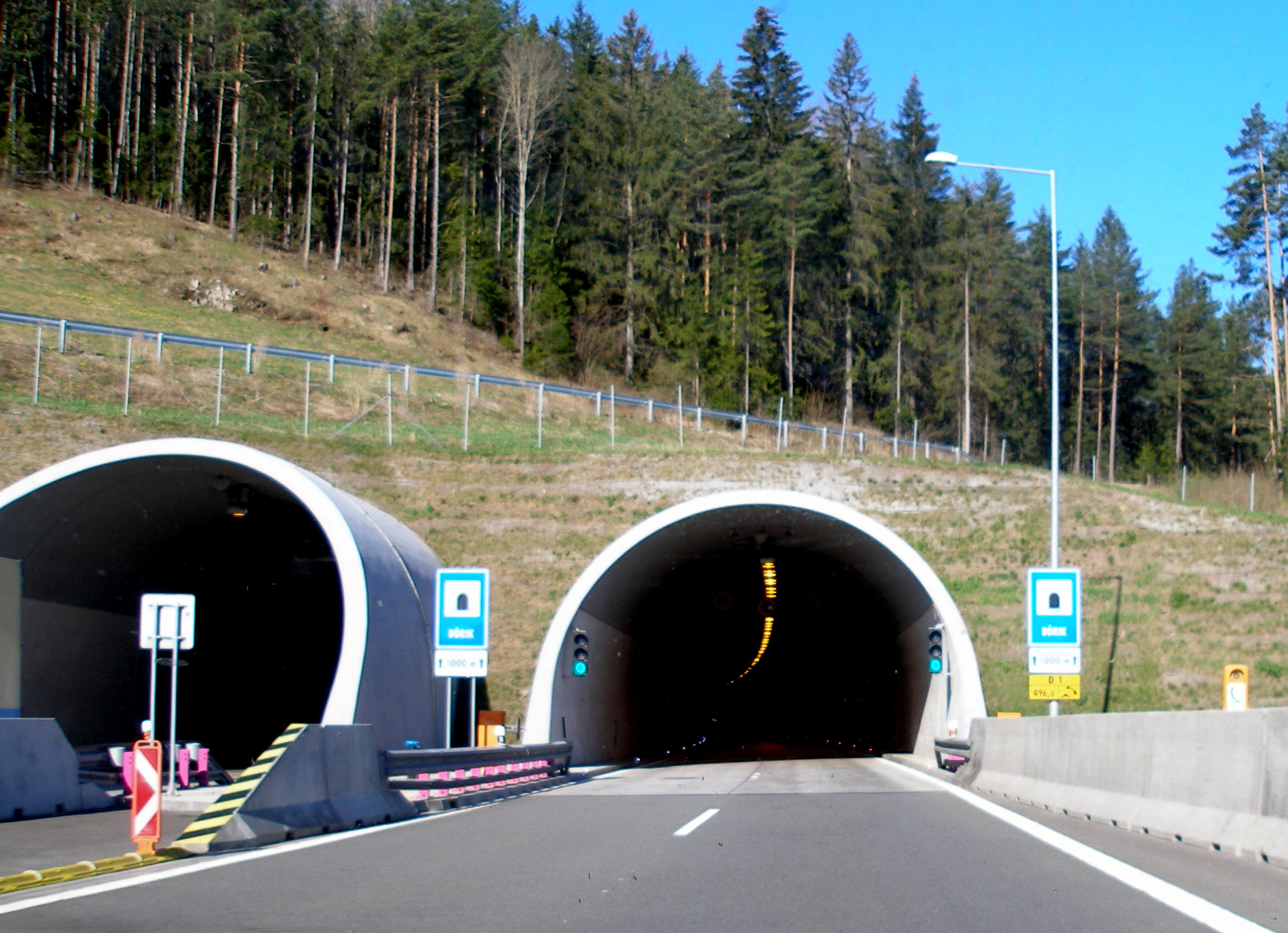 Tunel Bôrik na diaľnici D1 pri Batizovciach